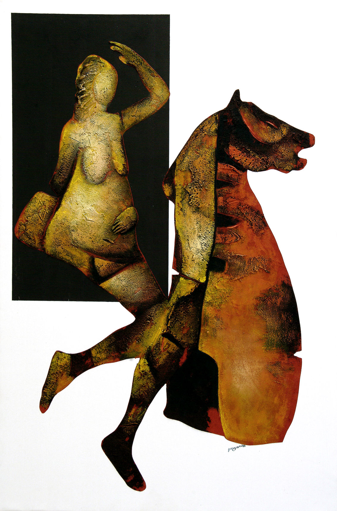 Vincenzo Musardo "Archetipo Mutante-Valchiria" olio polimaterico su tela cm. 80x120 (periodo Nuovo Figurativismo Concettuale)